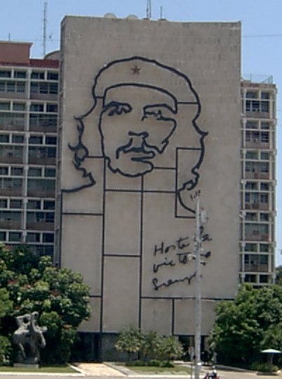 Frente del Ministerio del Interior (ex Ministerio de Industria). Imagen del Che Guevara. La Habana. Cuba